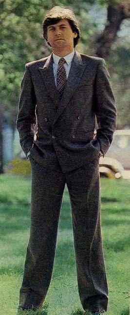 El actor Carlos Calvo en 1980